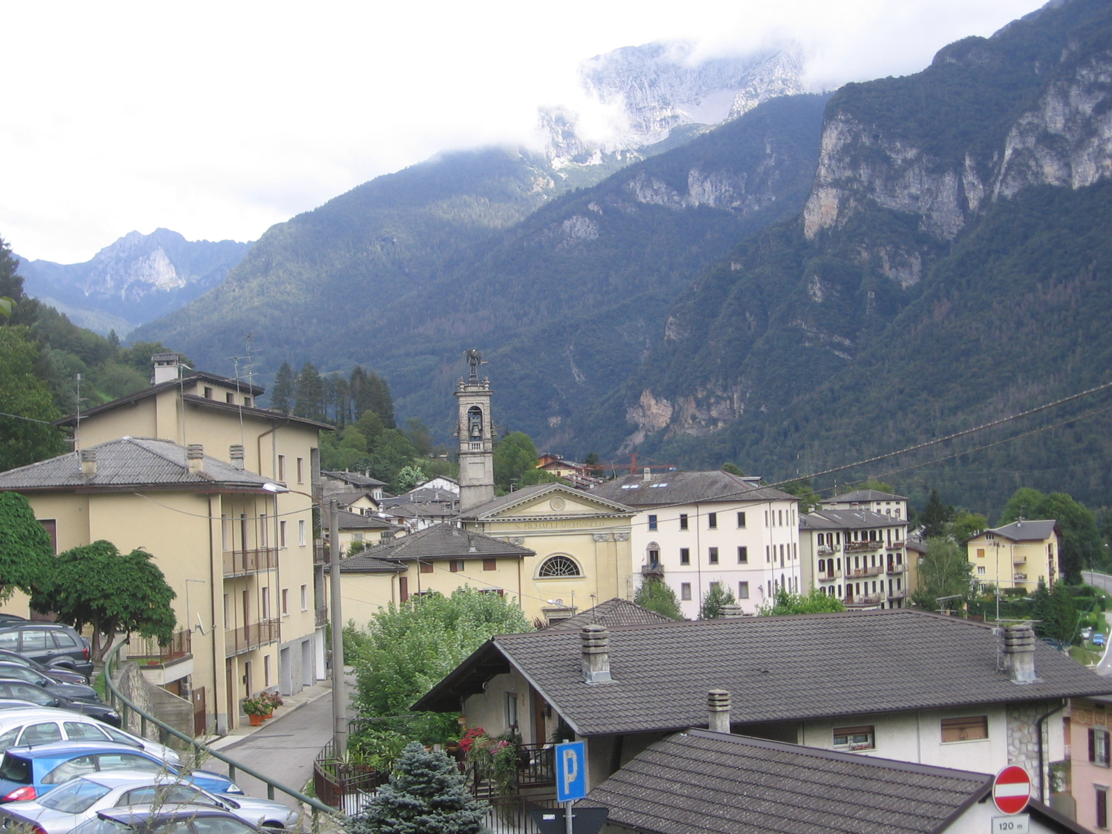 Valnegra, Bergamo, Italy